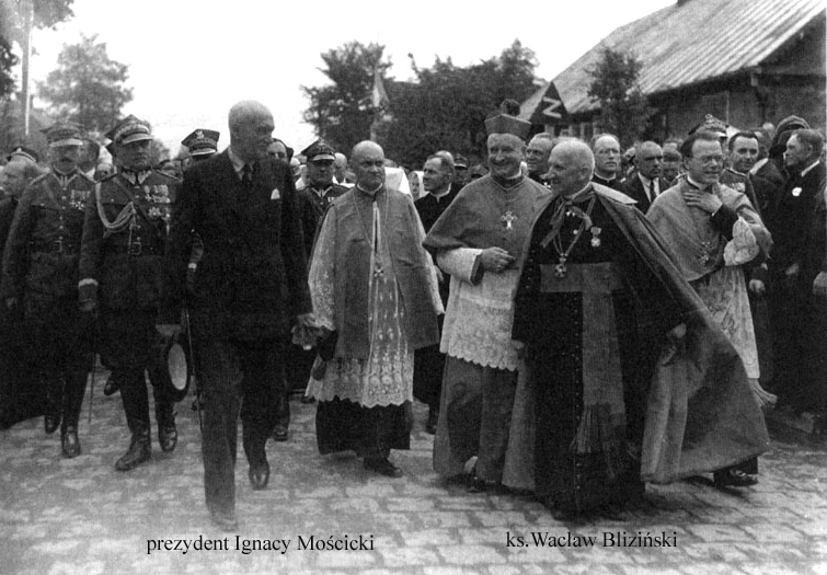 Na pierwszy planie m.in.: prezydent RP Ignacy Mościcki (trzeci od lewej), za prezydentem RP drugi od lewej premier generał dywizji Felicjan Sławoj Składkowski, ks. prałat Wacław Bliziński (pierwszy od prawej), ks. biskup włocławski Karol Mieczysław Radoński.